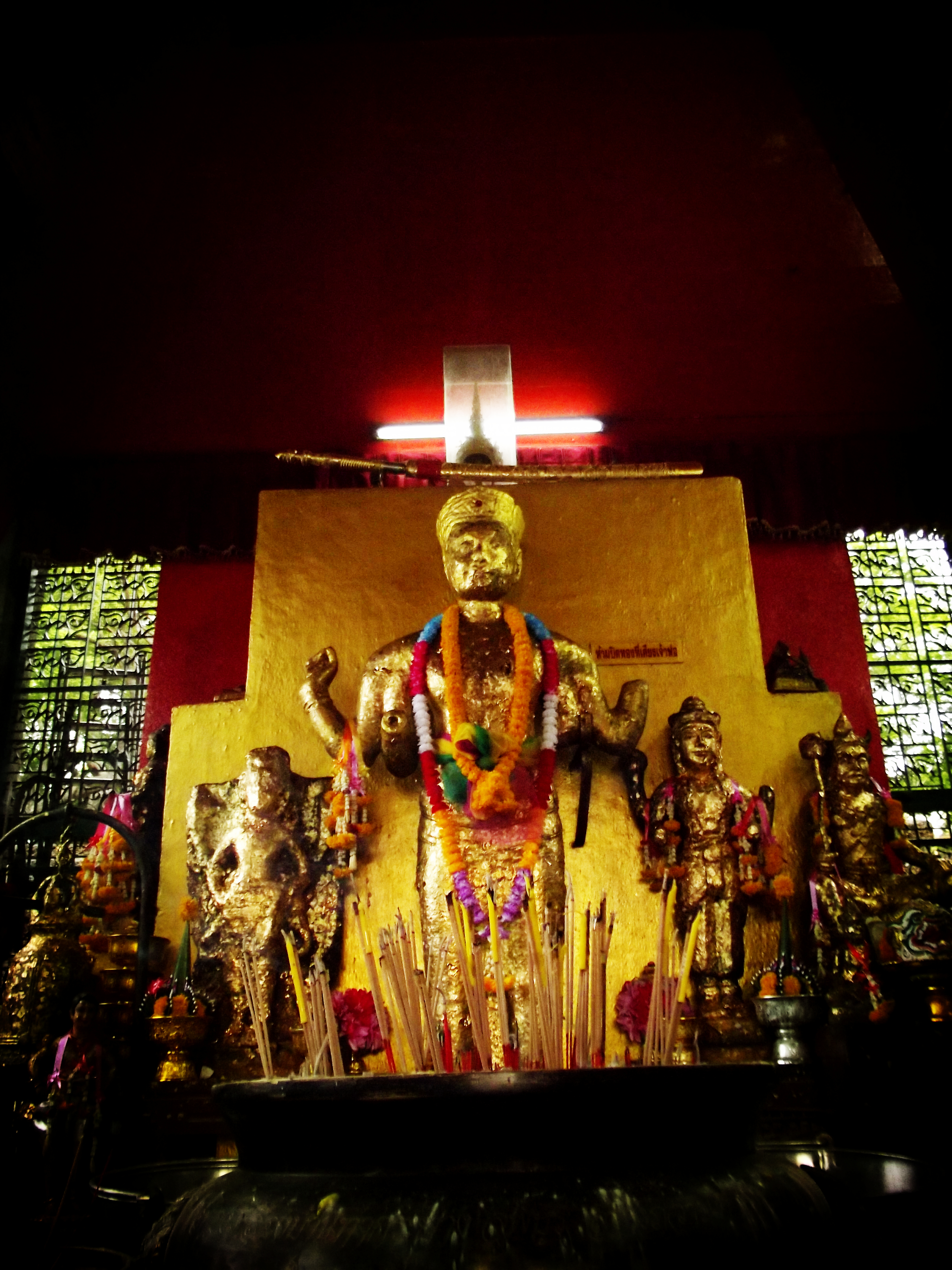 เจ้าพ่อศาลพระกาฬ ศาลเจ้าแห่งเมืองลิง สิ่งศักดิ์สิทธิ์คู่เมือง